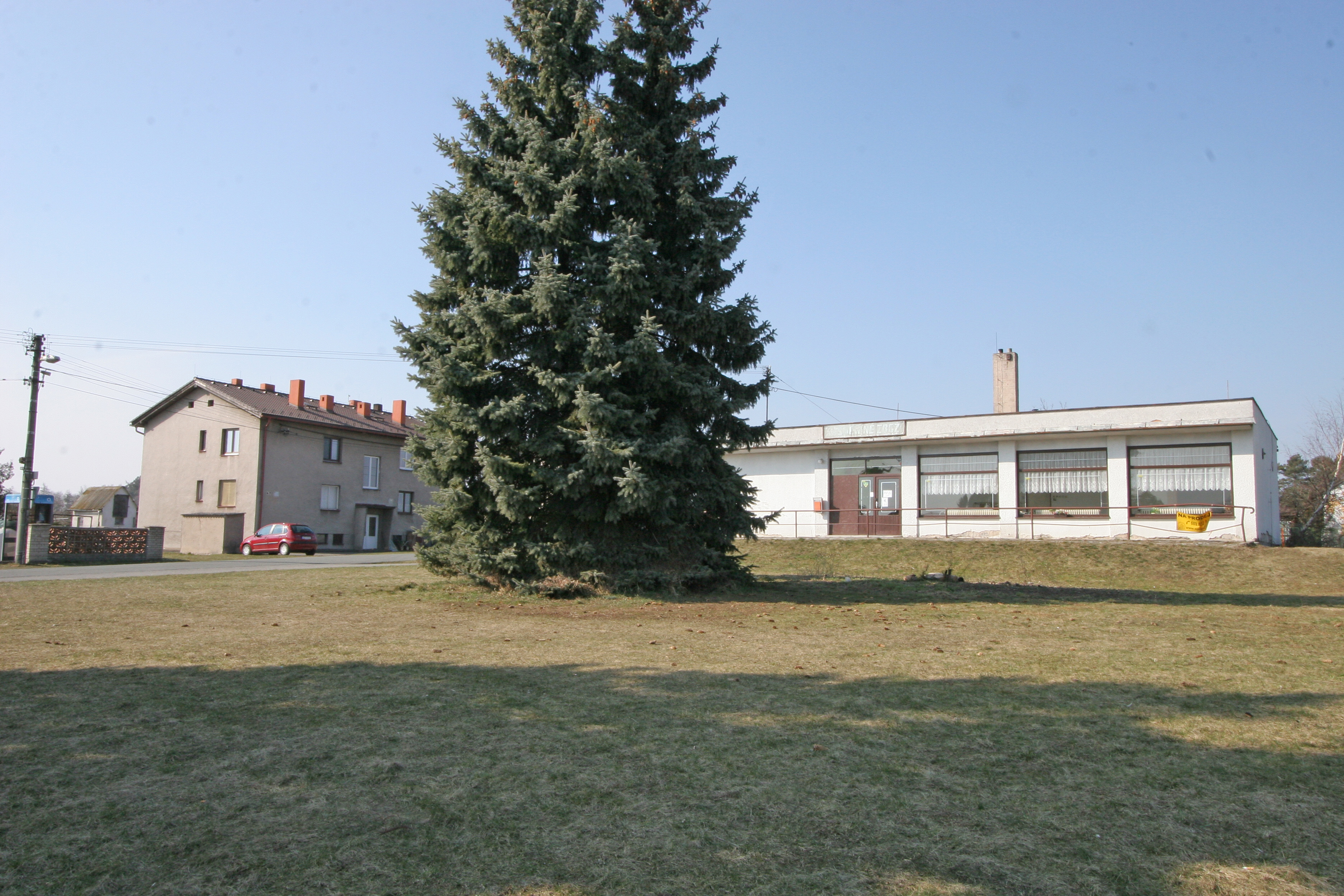 Kasalice prodejna